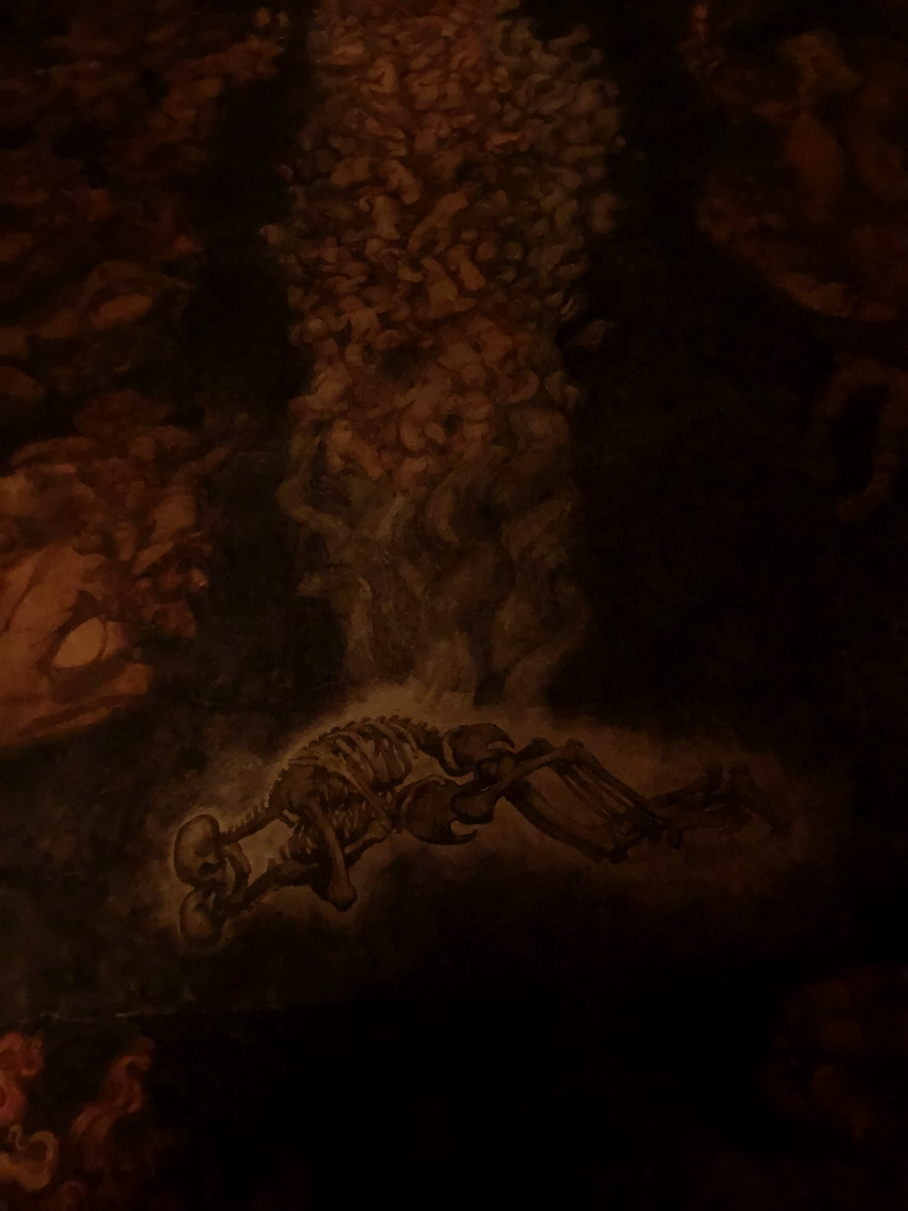 Emanuel Vigelands Museum